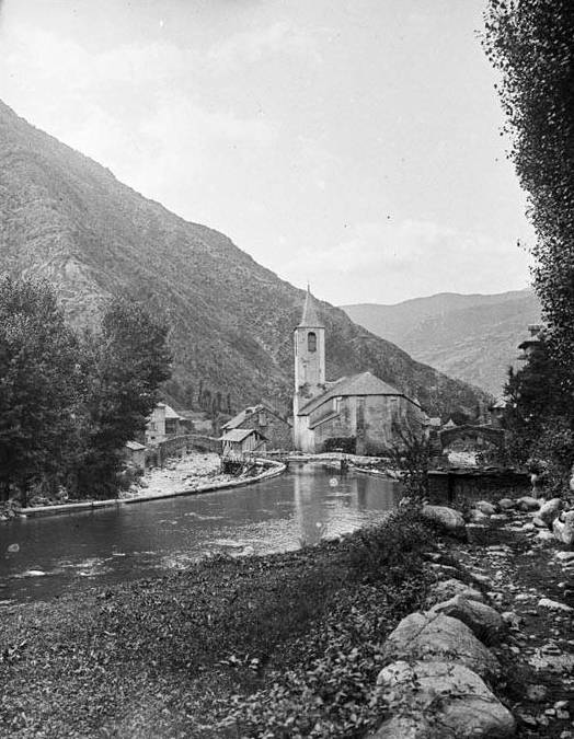 Imatge